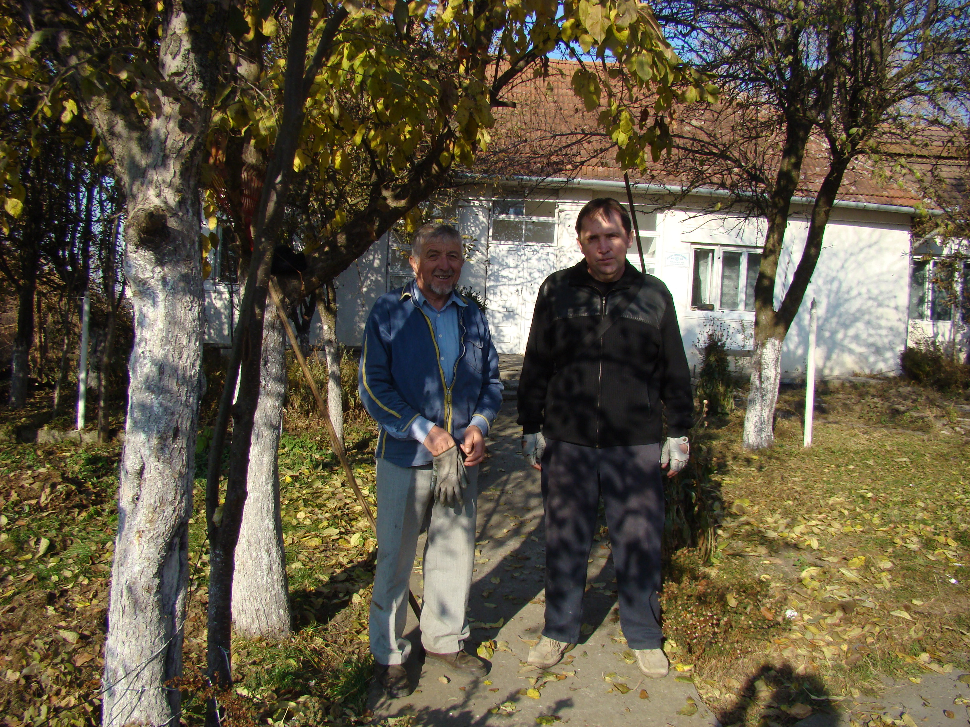 Biserica de lemn „Sfinții Arhangheli" din Noșlac, județul Alba